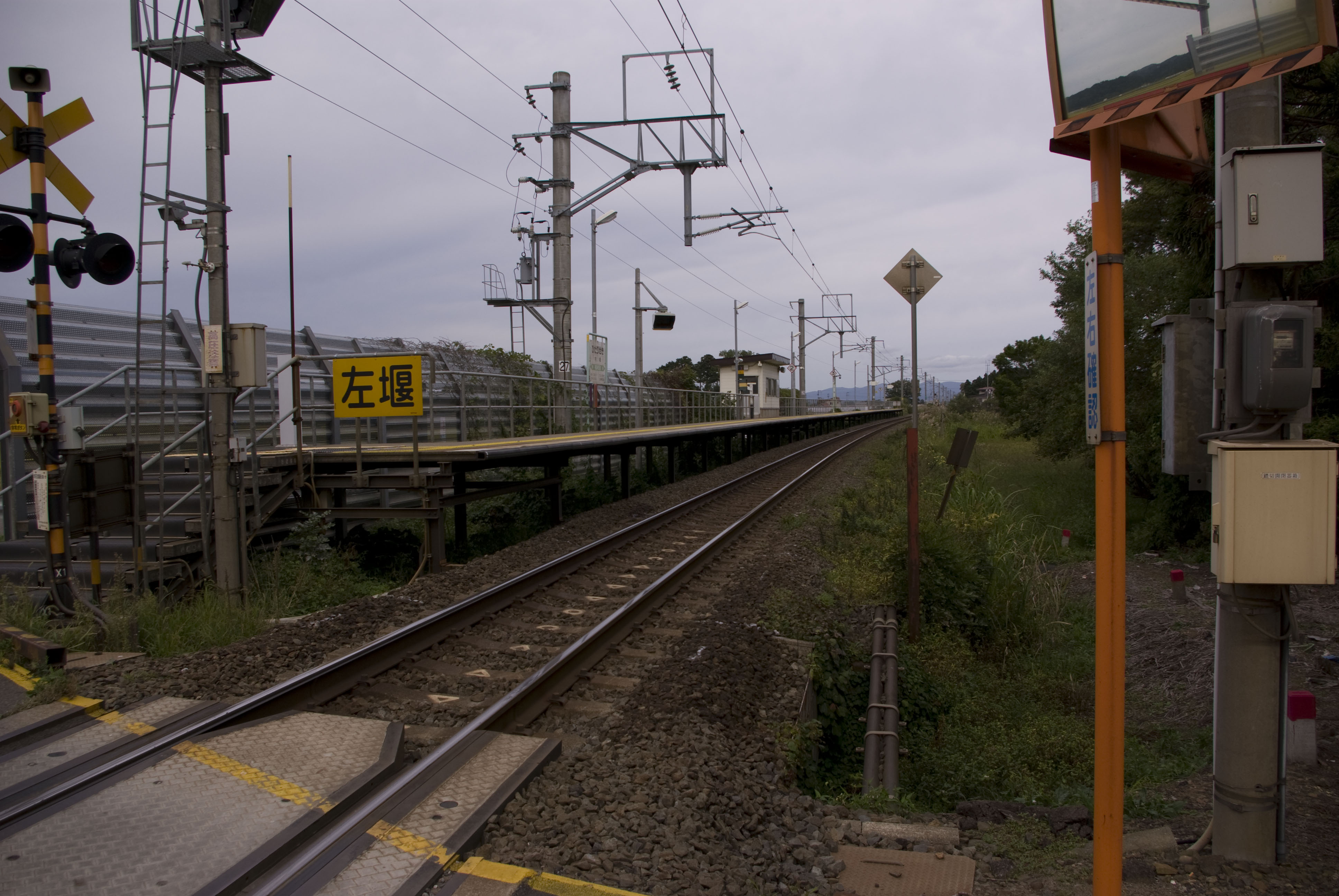 東日本旅客鉄道株式会社津軽線左堰駅